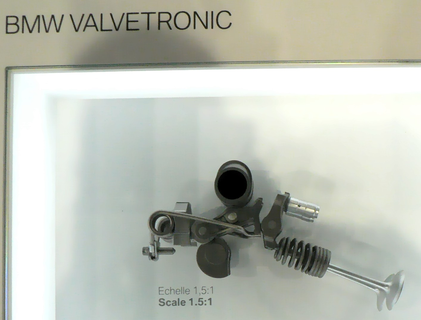 Mondial de l'automobile, Paris 2006